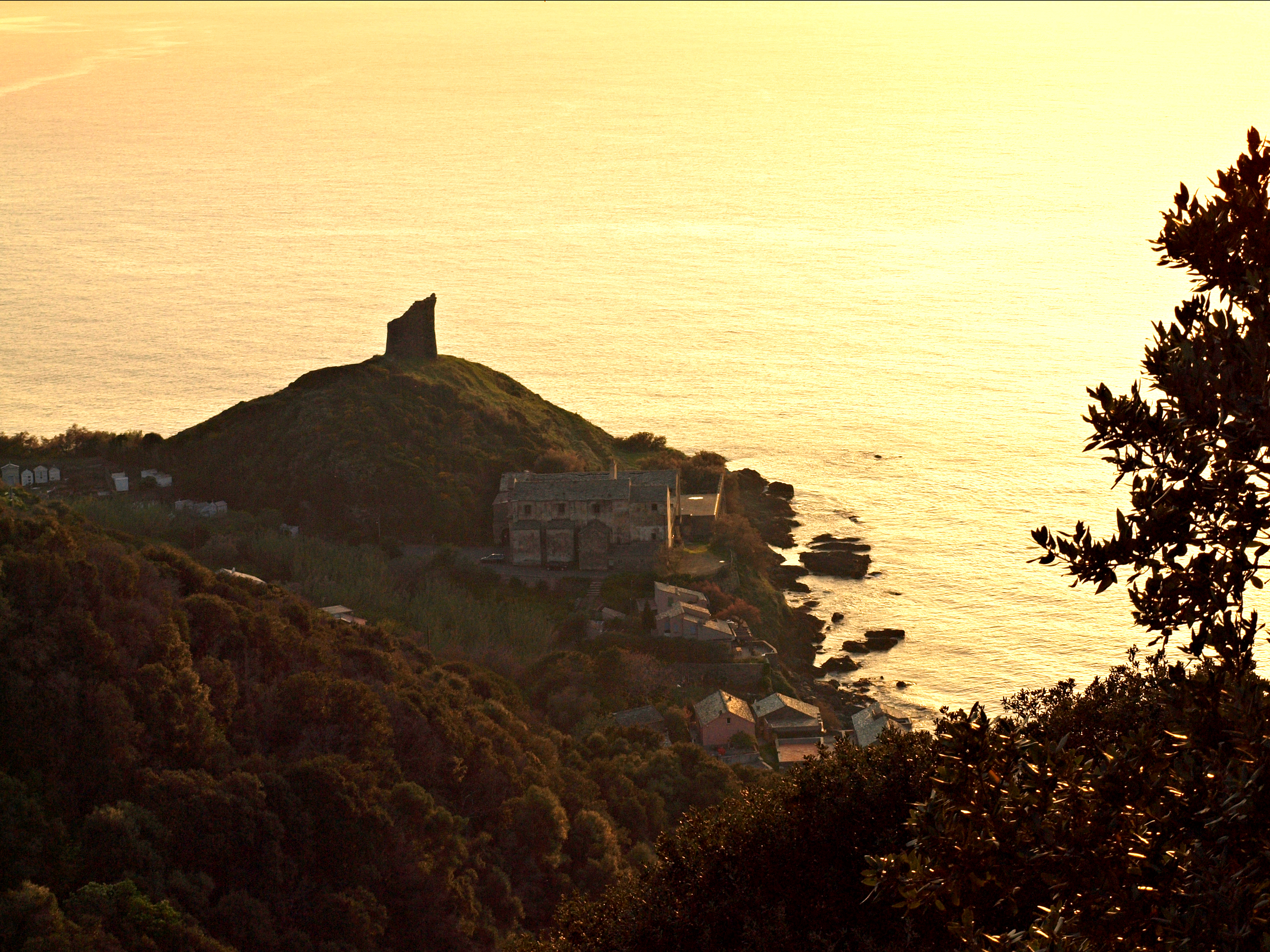 Pino (Corsica) - Marine de Scalo au couchant